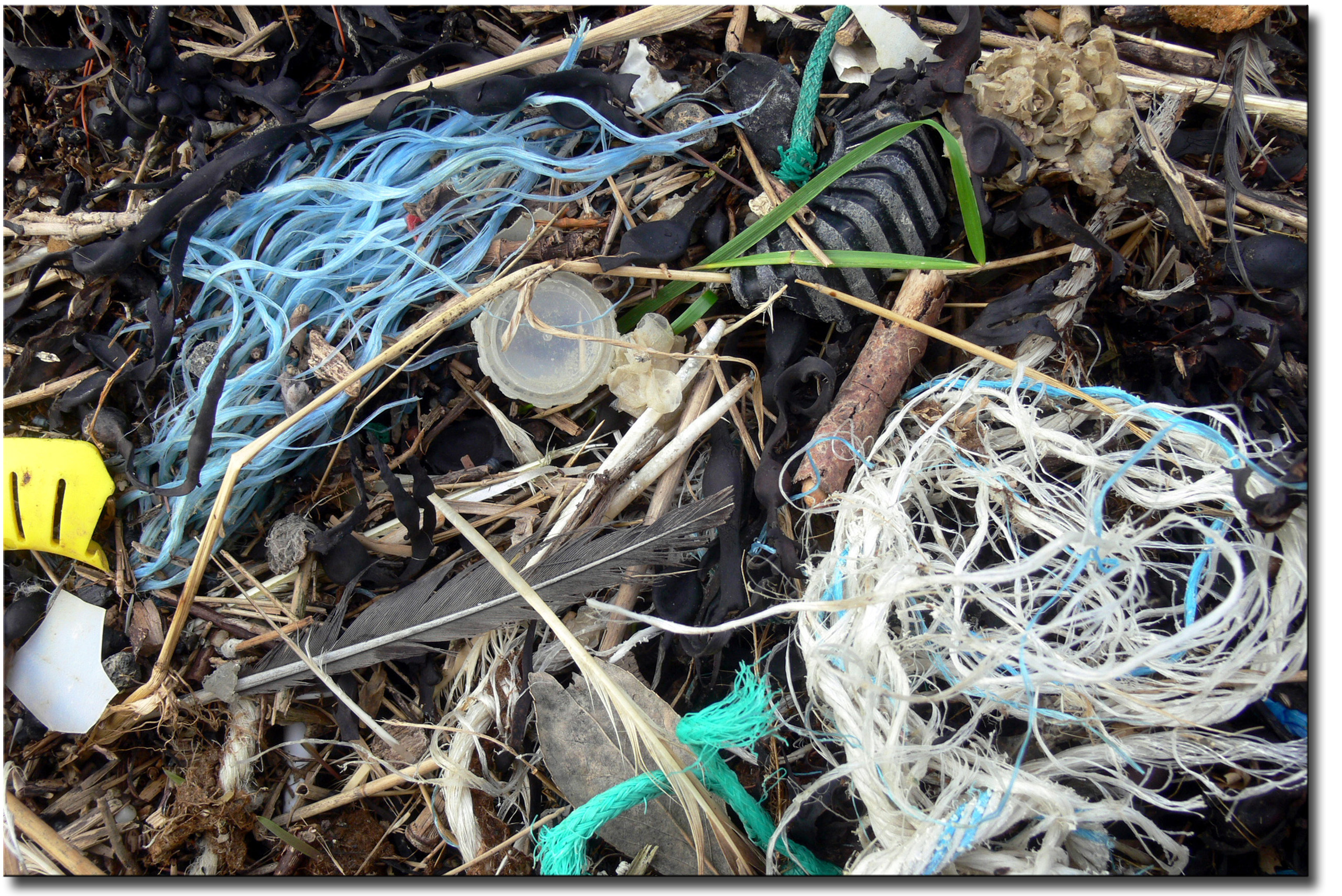 Mélanges de plantes rejetées par la mer et d'objets de fabrication humaine, dont résidus de cordes et filets de nylon (très peu et très lentement dégradables) et éléments de munitions de chasse (indicateurs d'une possible pollution par le plomb), ici sur le bord d'un petit cours d'eau (le ruisseau de la Manchue) se jetant dans la mer, en France, dans le Pas de Calais, à Audresselle.